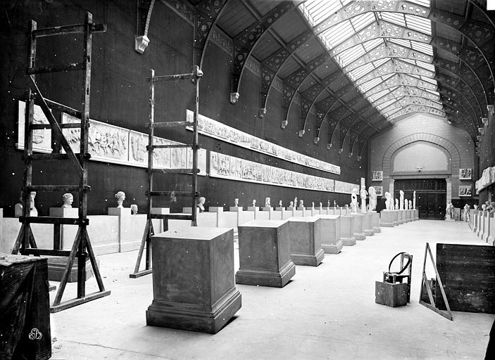 Musée de sculpture comparée : vue intérieure de la salle des Antiques